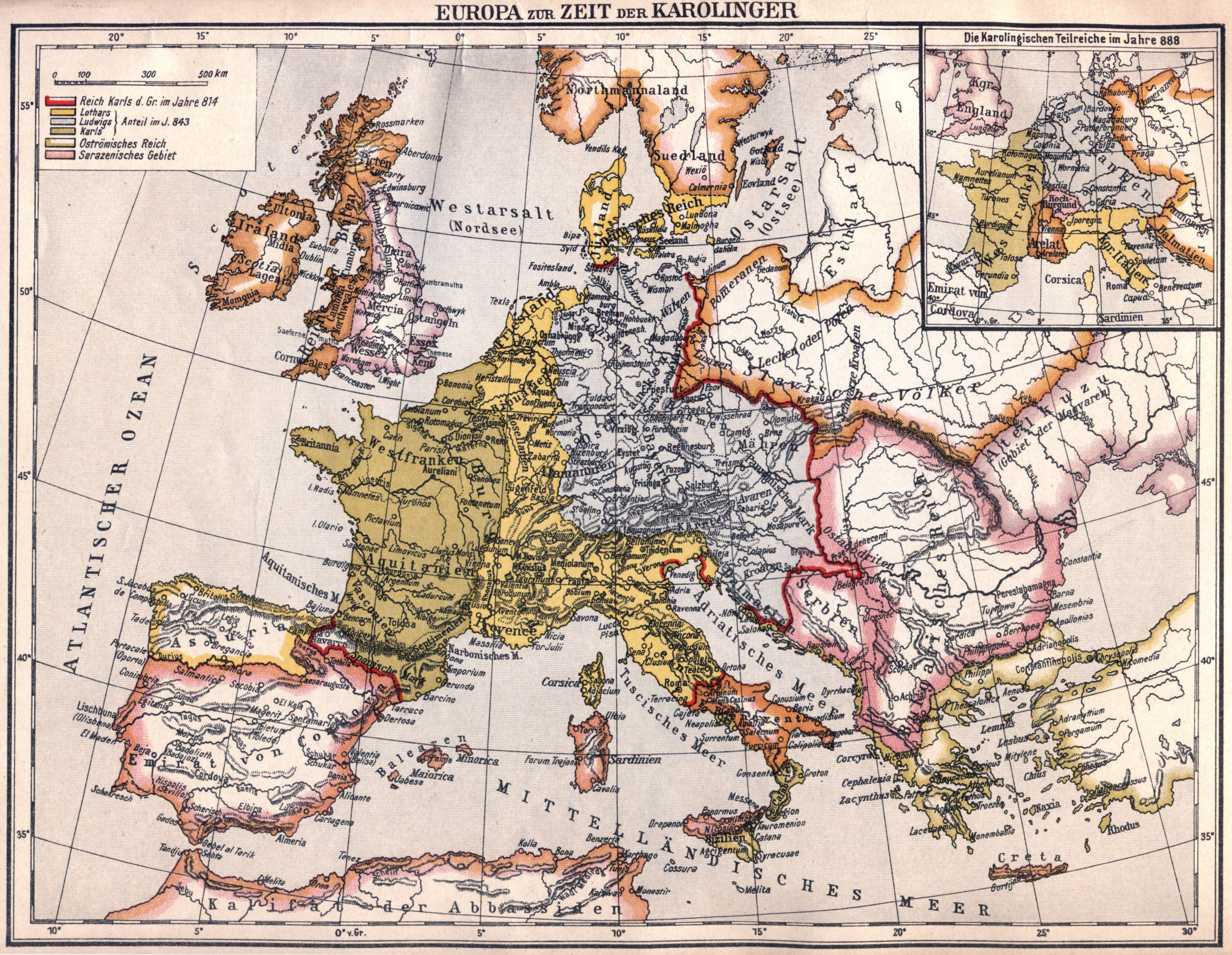 Europa zur Zeit der Karolinger, Spamer's "Illustrierte Weltgeschichte"